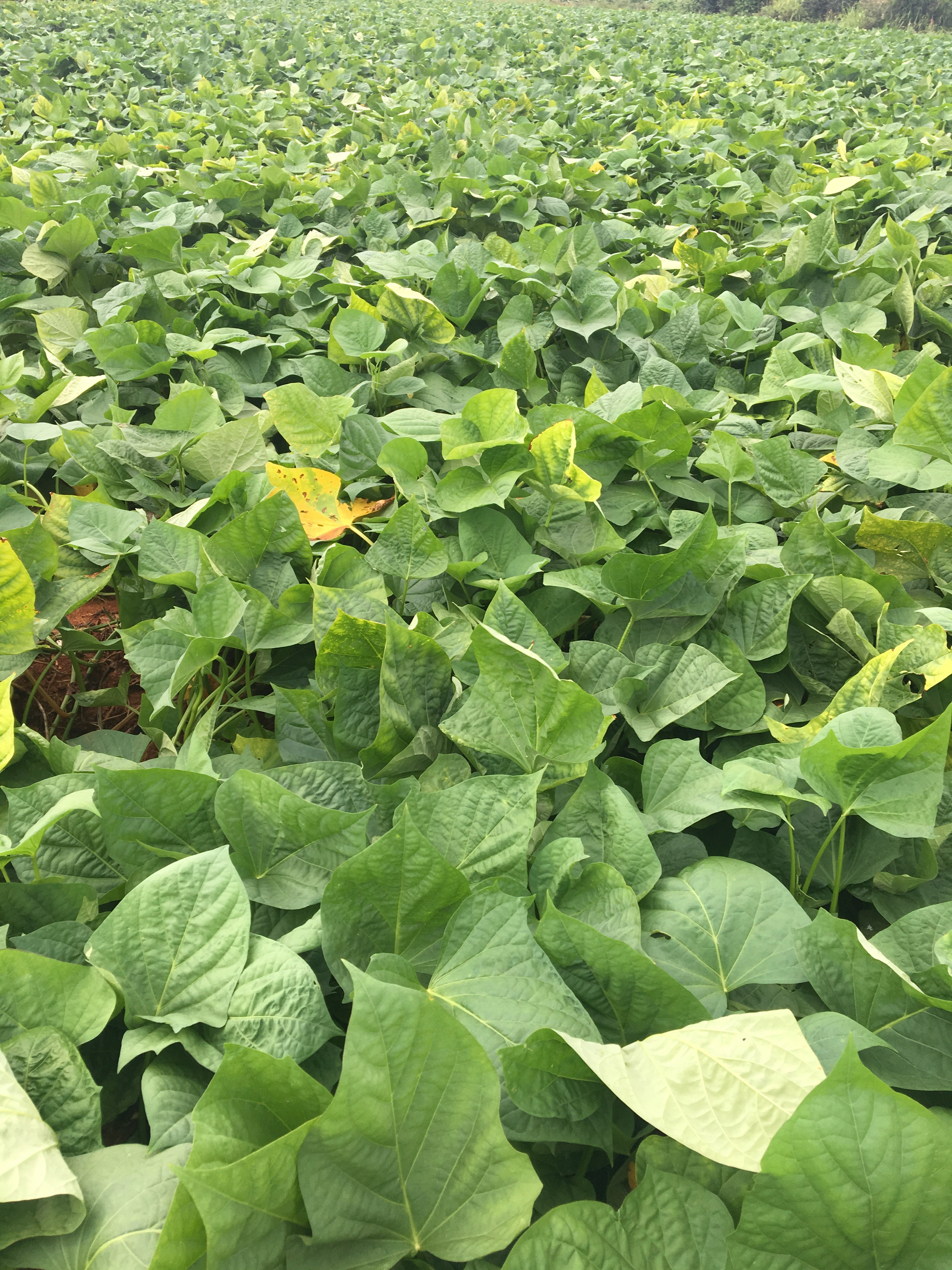 中文（台灣）: 地瓜葉，臺灣臺中市